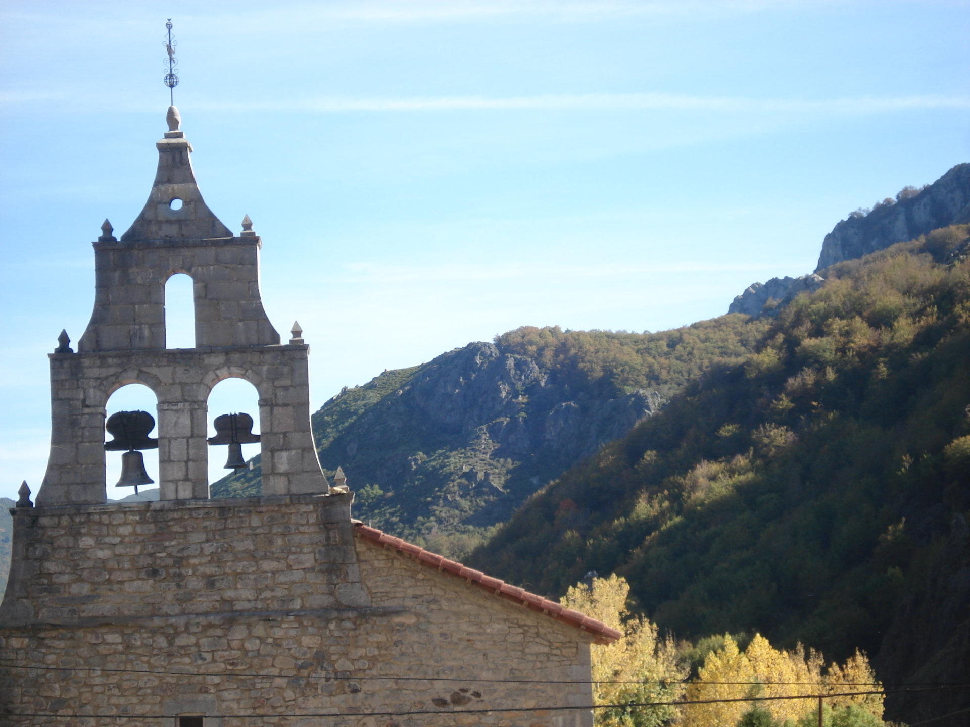 iglesia de una pequeña localidad leonesas próxima a Picos de Europa ,Las Salas